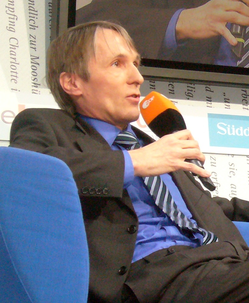 Dieses Fotos dürfen Sie honorarfrei nutzen, wenn Sie folgenden credit beachten: Copyright: Das blaue Sofa / Club Bertelsmann. Hubertus Knabe, geboren 1959 in Unna, ist wissenschaftlicher Direktor der Gedenkstätte Berlin-Hohenschönhausen im ehemaligen zentralen Untersuchungsgefängnis des DDR-Staatssicherheitsdienstes. Von 1992 bis 2000 war er in der Forschungsabteilung des Bundesbeauftragten für die Stasi-Unterlagen (Gauck-Behörde) tätig. Zuletzt erschienen von ihm „ Die Täter sind unter uns“ (2007) und „Honeckers Erben“ (2009).